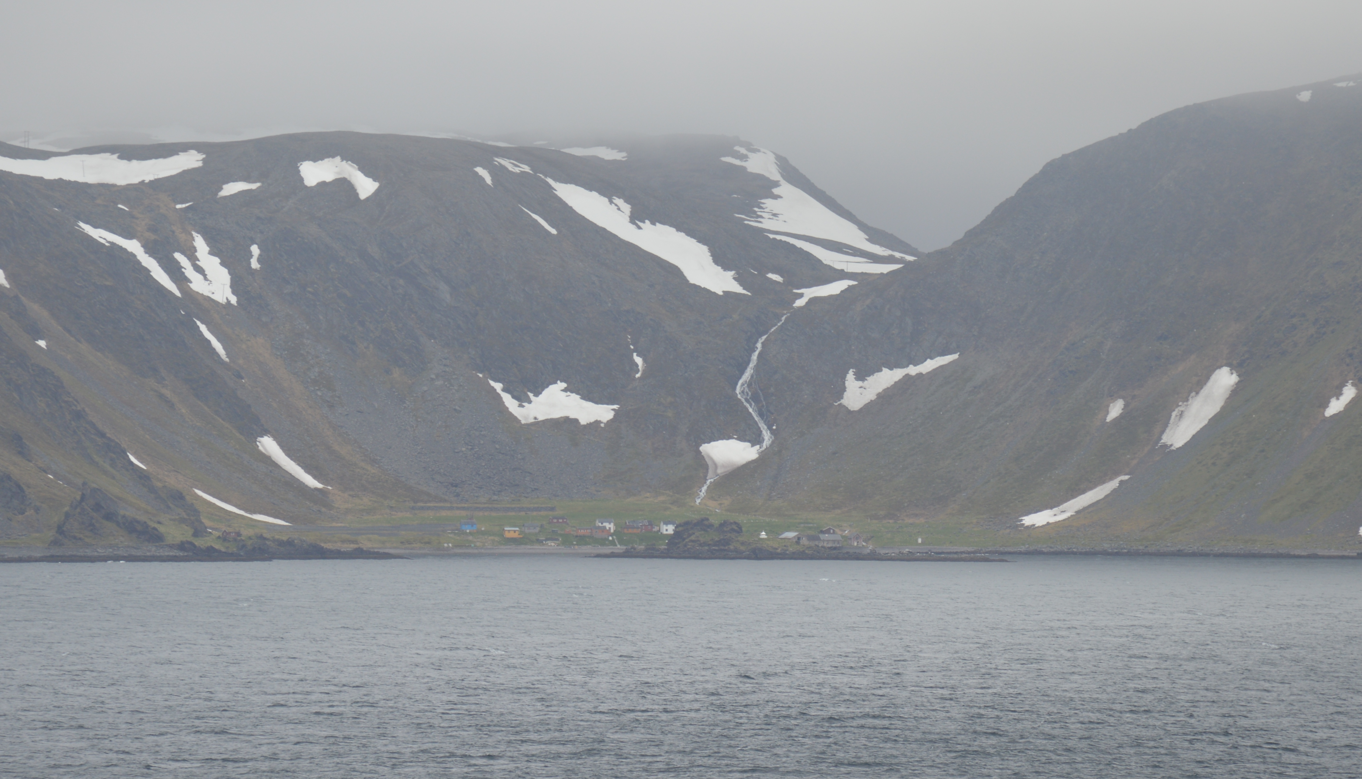 Kjelvik